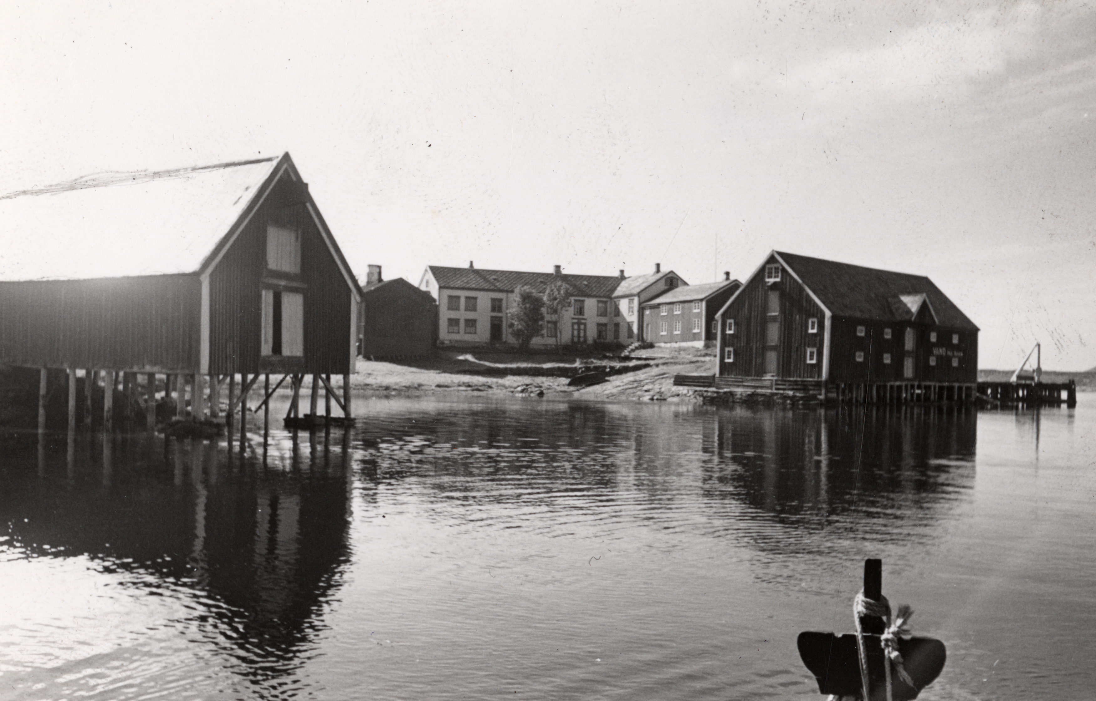 Selsøyvik handelssted i Rødøy, Nordland Oversikt